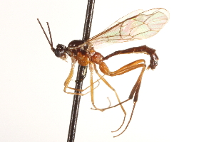 bild av Megastylus caseyi.